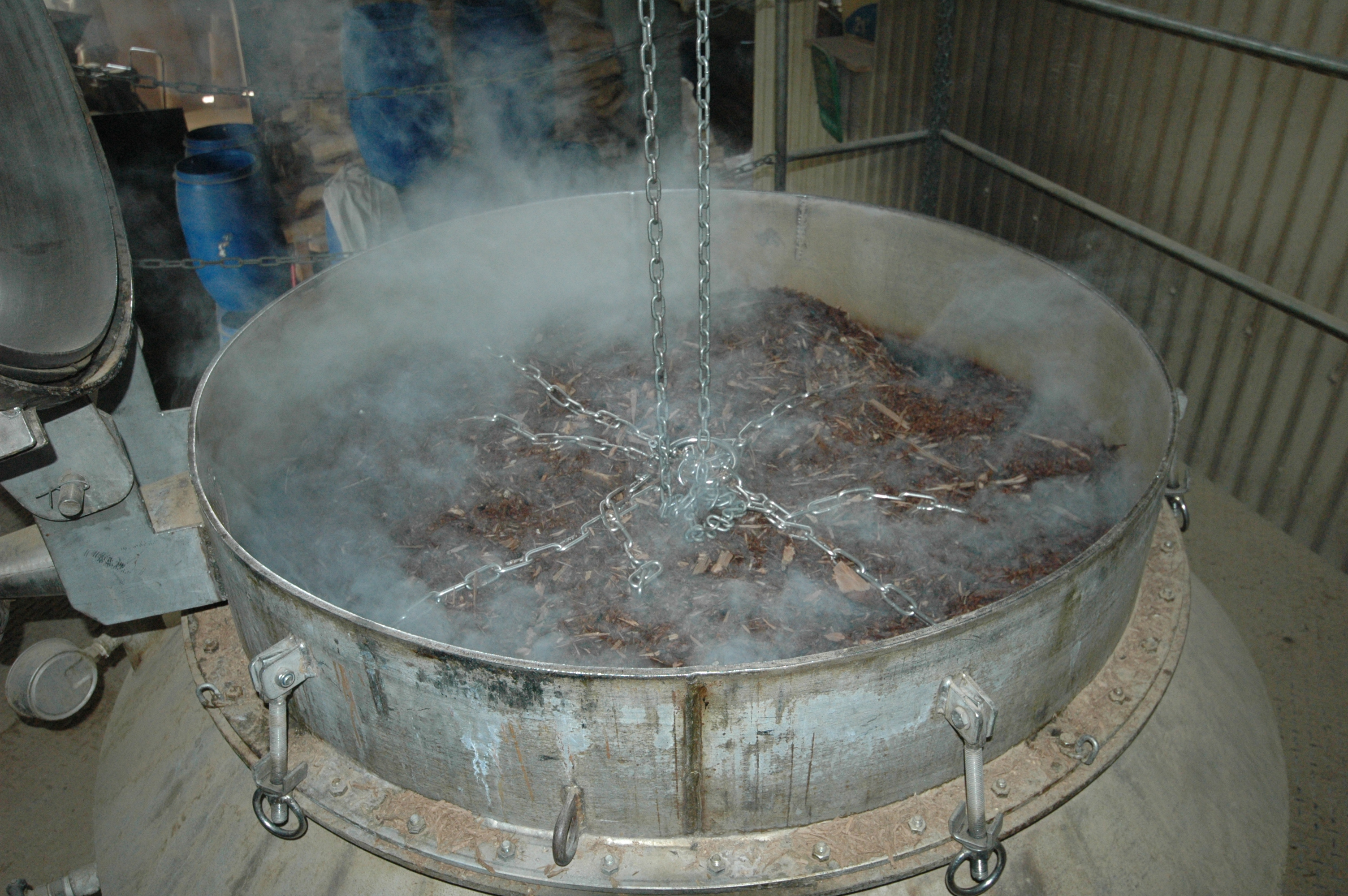 Distillation du bois de Santal en Egypte.